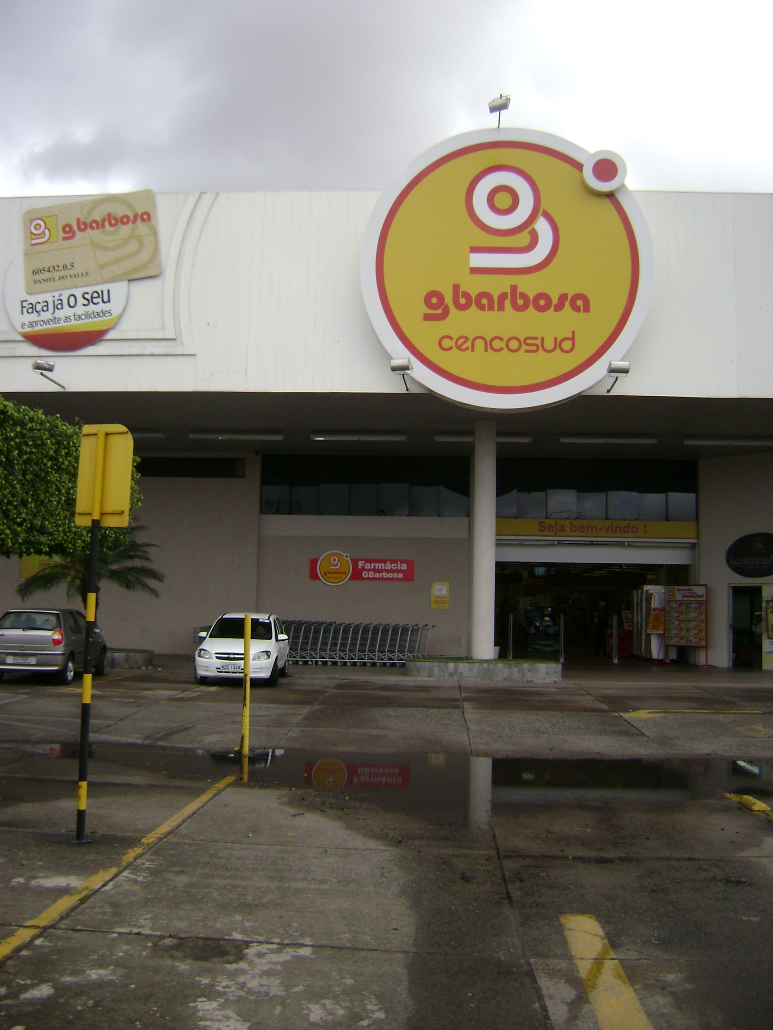 Supermercado da GBarbosa/Cencosud na avenida J. J. Santos, em Feira de Santana, Bahia, Brasil.